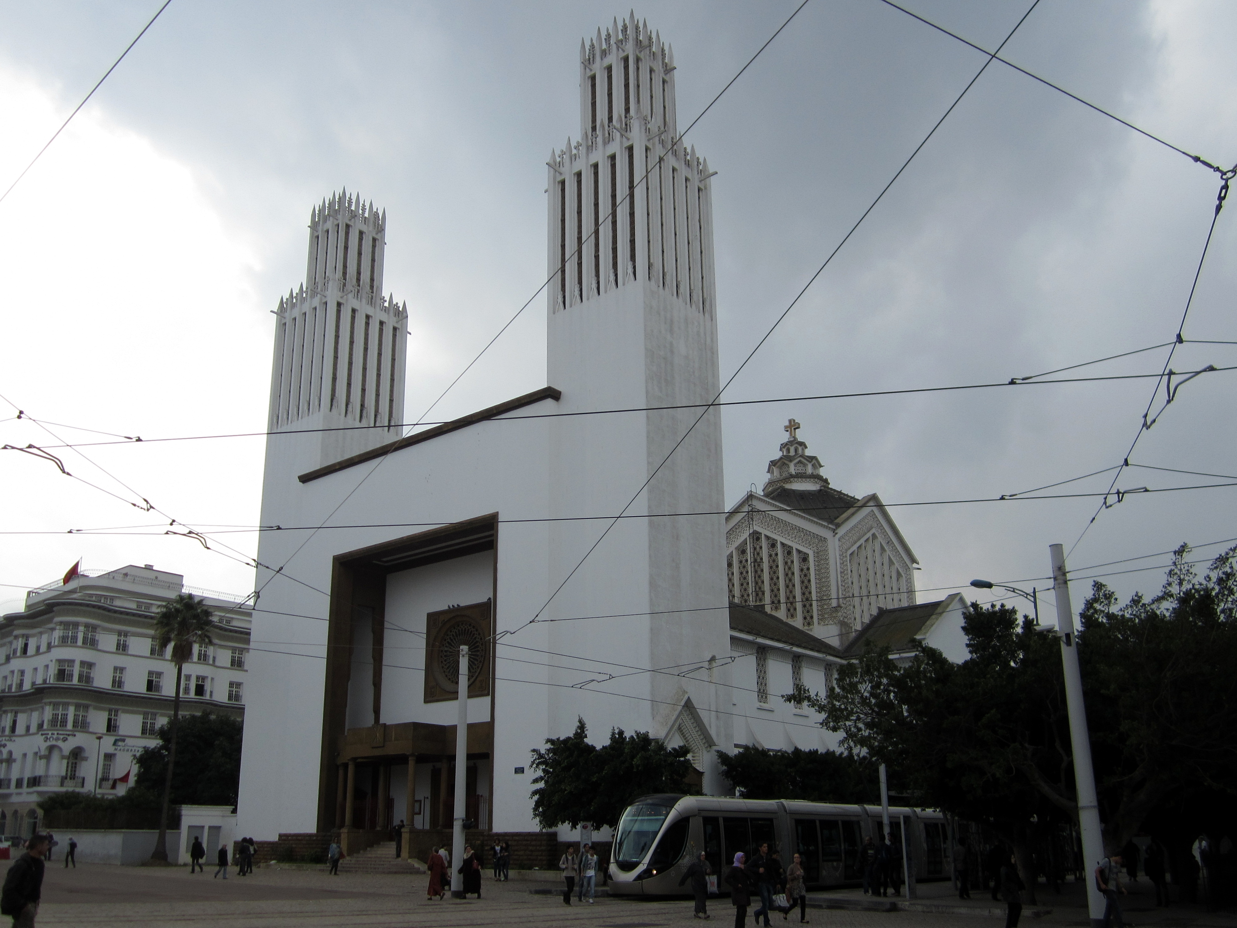 Католический кафедральный собор Рабата (1919-1937)